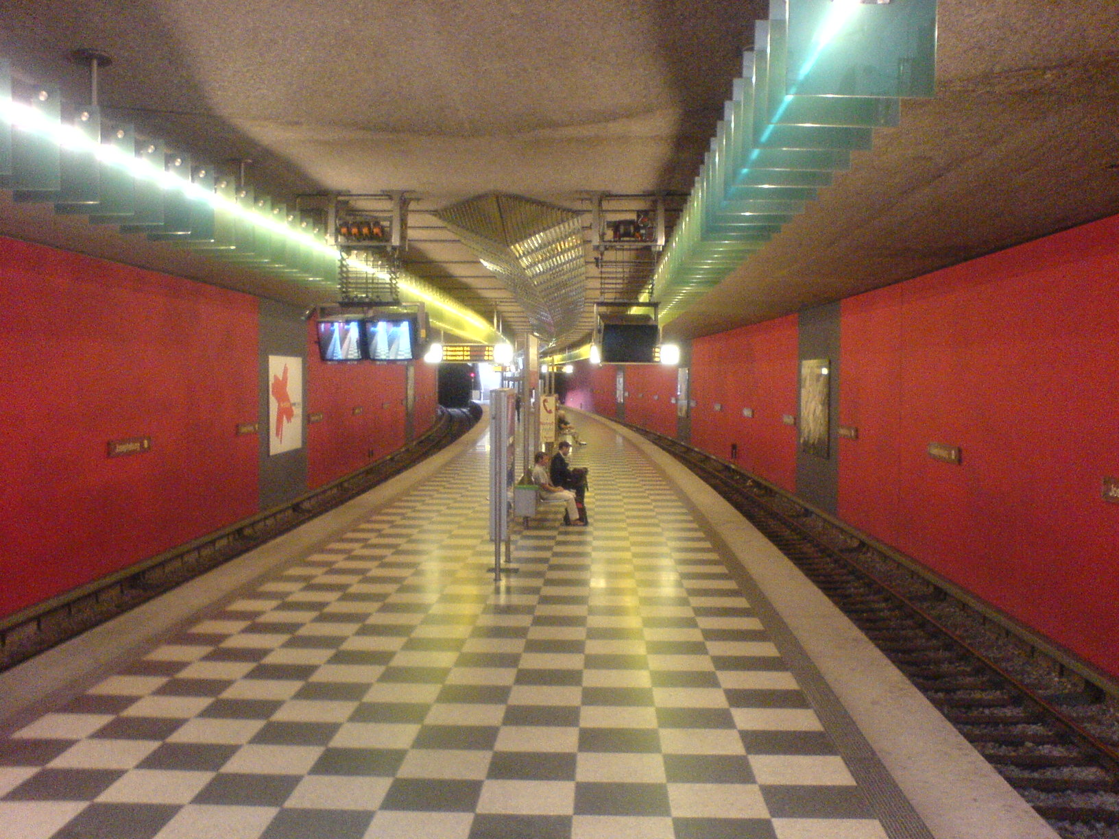 Bahnsteig des U-Bahnhofs Josphsburg (Linie U2) in Richtung stadteinwärts